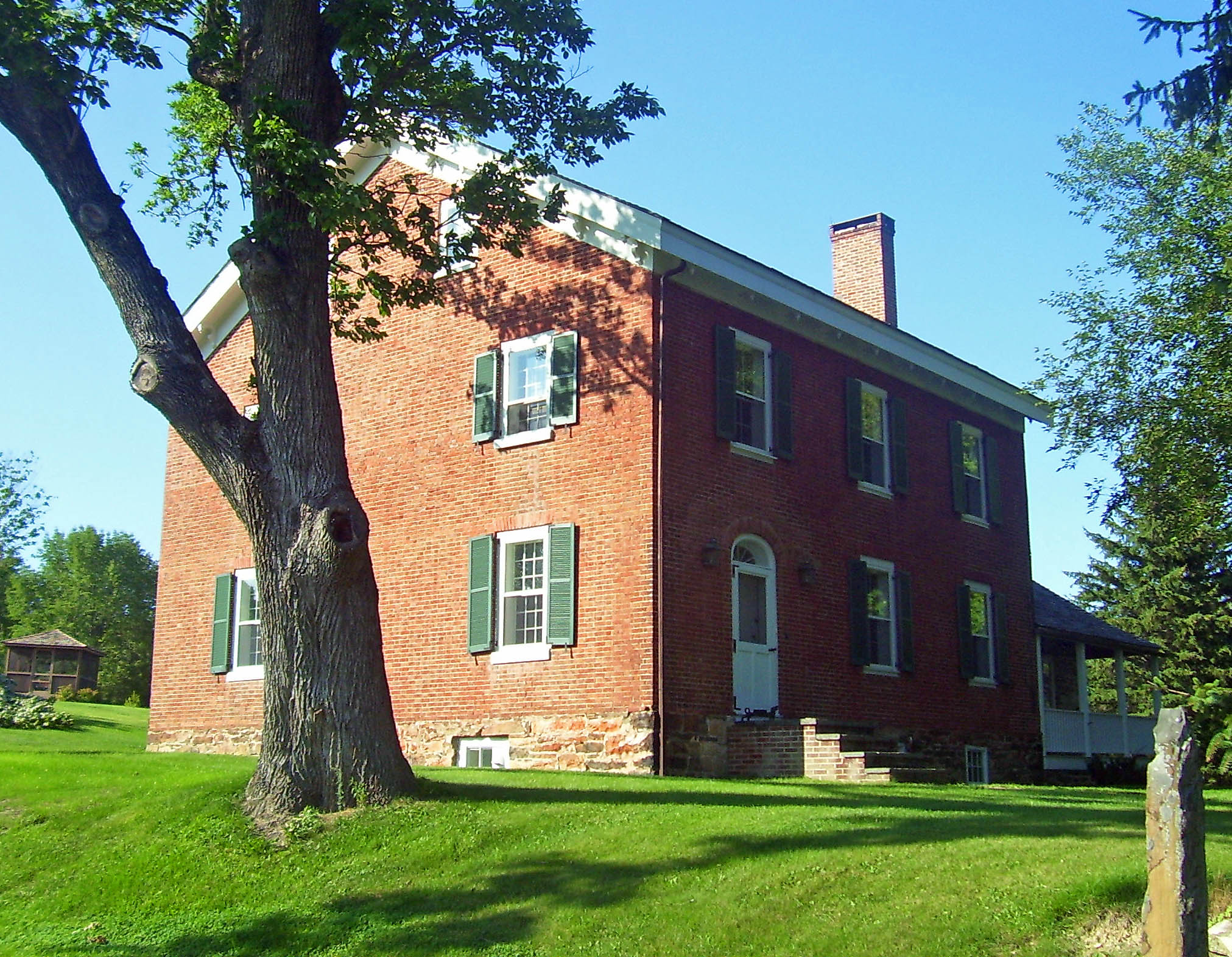 Hendrikus DuBois House in Gardiner, NY, USA